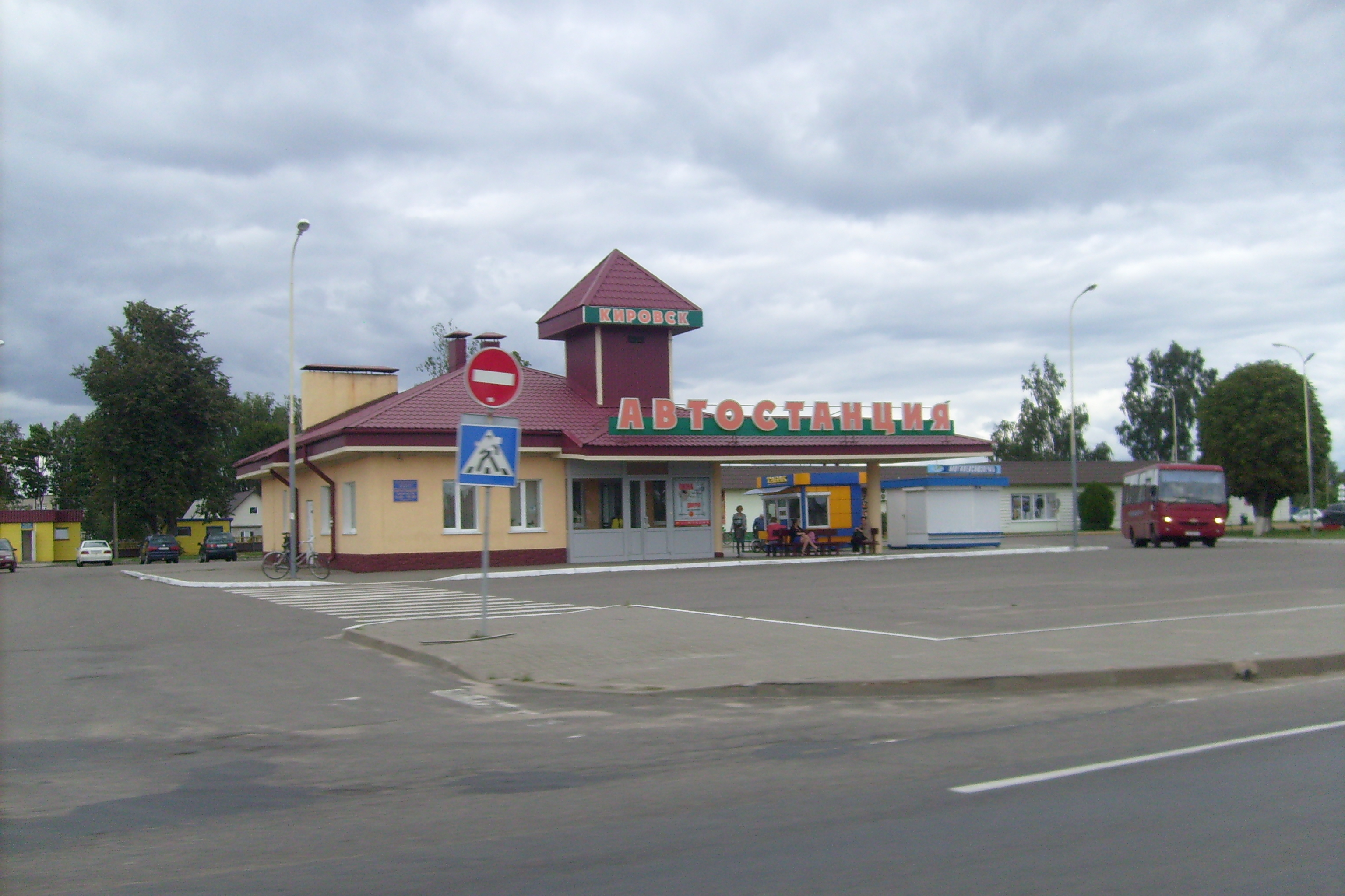 Автостанция в городе Кировск (Белоруссия)